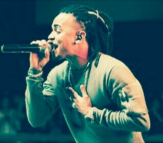 Imagen de ozuna